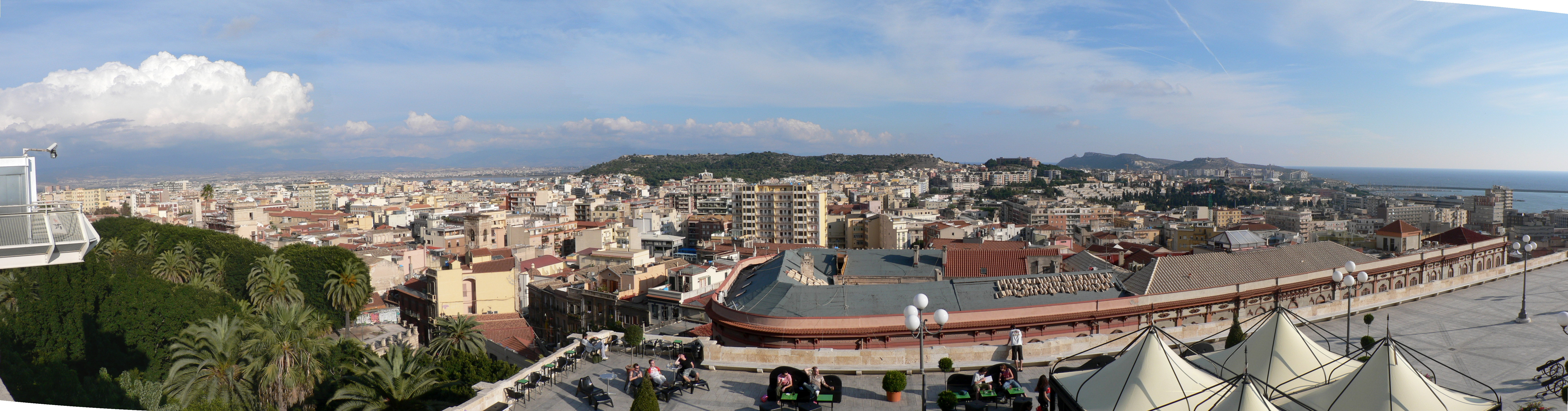 Cagliari, Sardegna, Italia